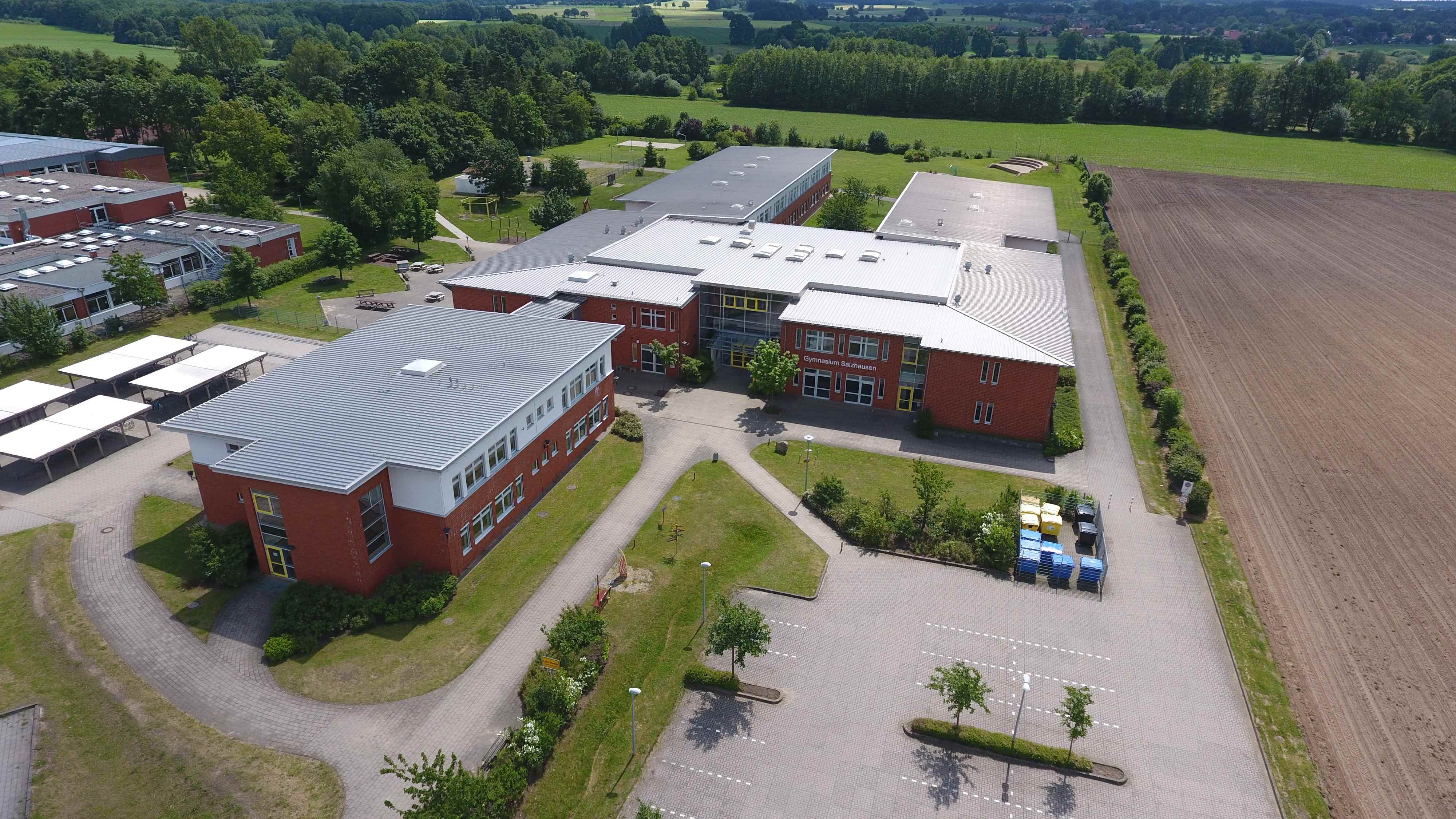 Luftbild des Gymnasiums Salzhausen